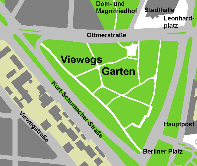 Karte des Parks Viewegs Garten im Braunschweiger Stadtquartier Viewegs Garten.